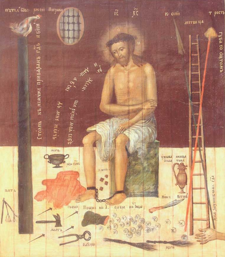 Russian Icon "Jesus in jail with Instruments of the Passion". Икона "Христос в темнице с Орудиями Страстей" (редкий сюжет для православной иконы)